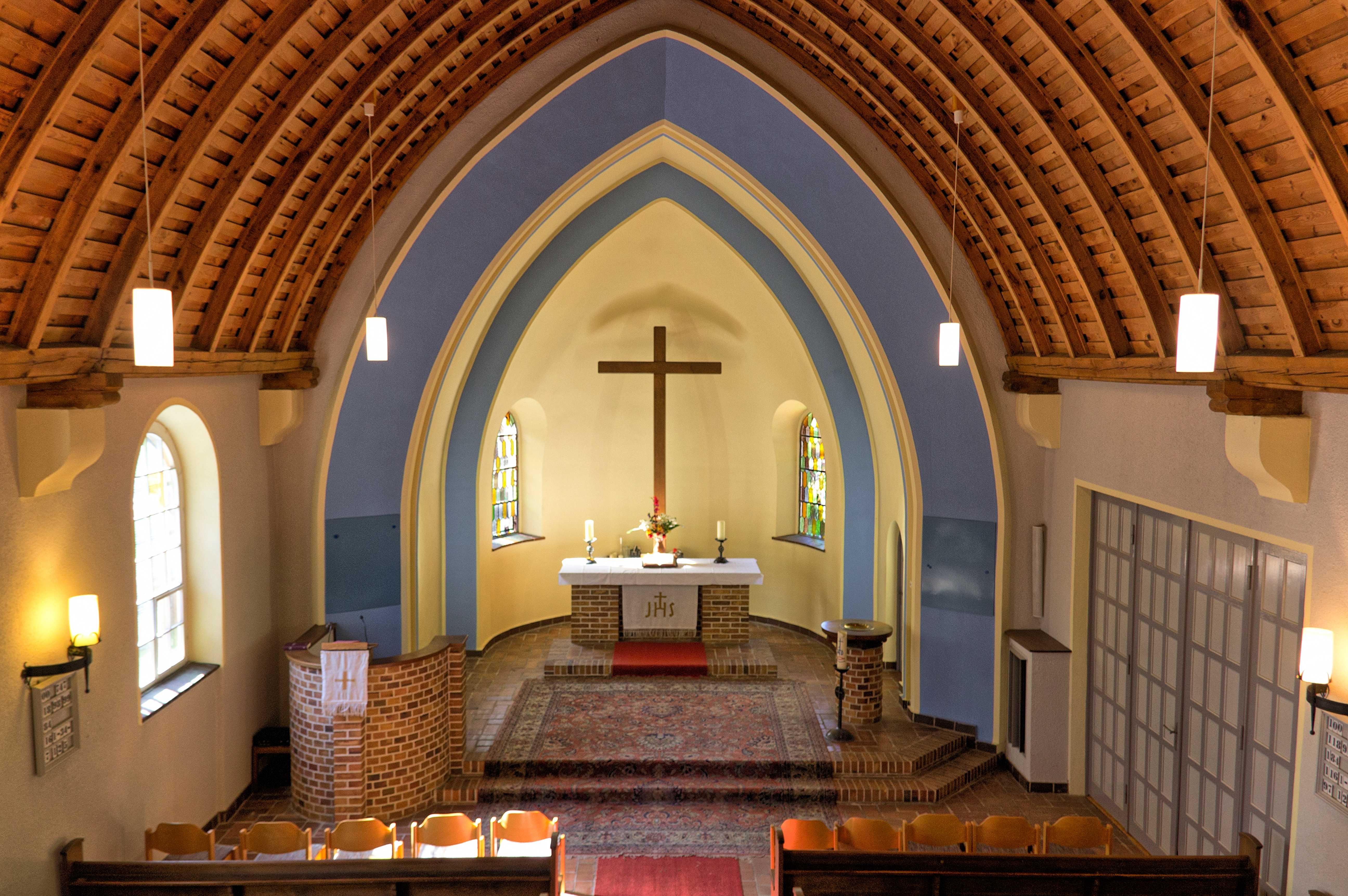 Dorfkirche Borgsdorf in Hohen Neuendorf Chor und Apsis